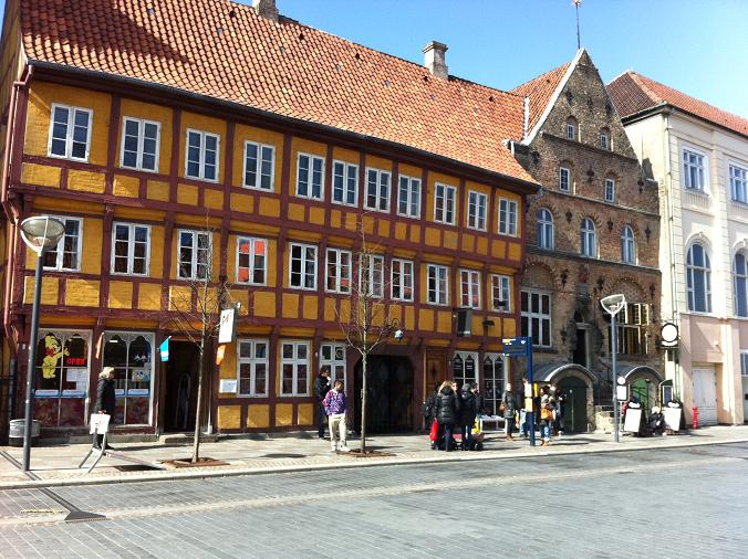 Jørgen Olufsens købmandsgård set fra Østerå